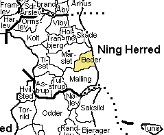 Kort der viser Beder Sogn, Ning Herred, Århus Amt, Denmark.